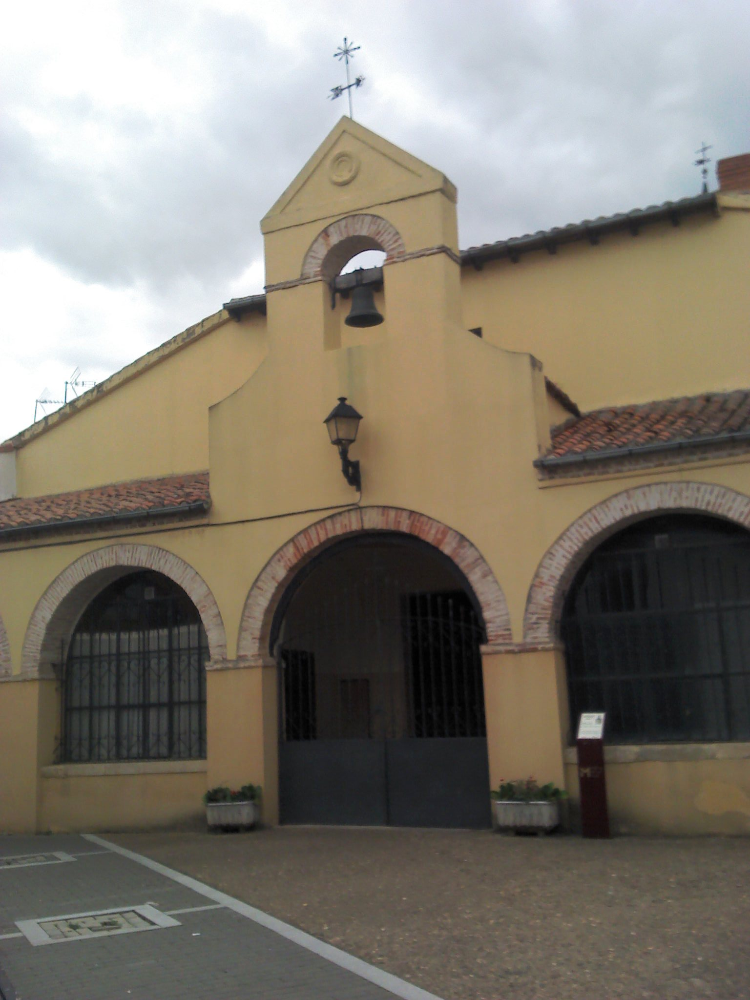 Iglesia de Santa María Mansilla de las Mulas ubicada dentro del recinto amurallado de Mansilla de las Mulas.